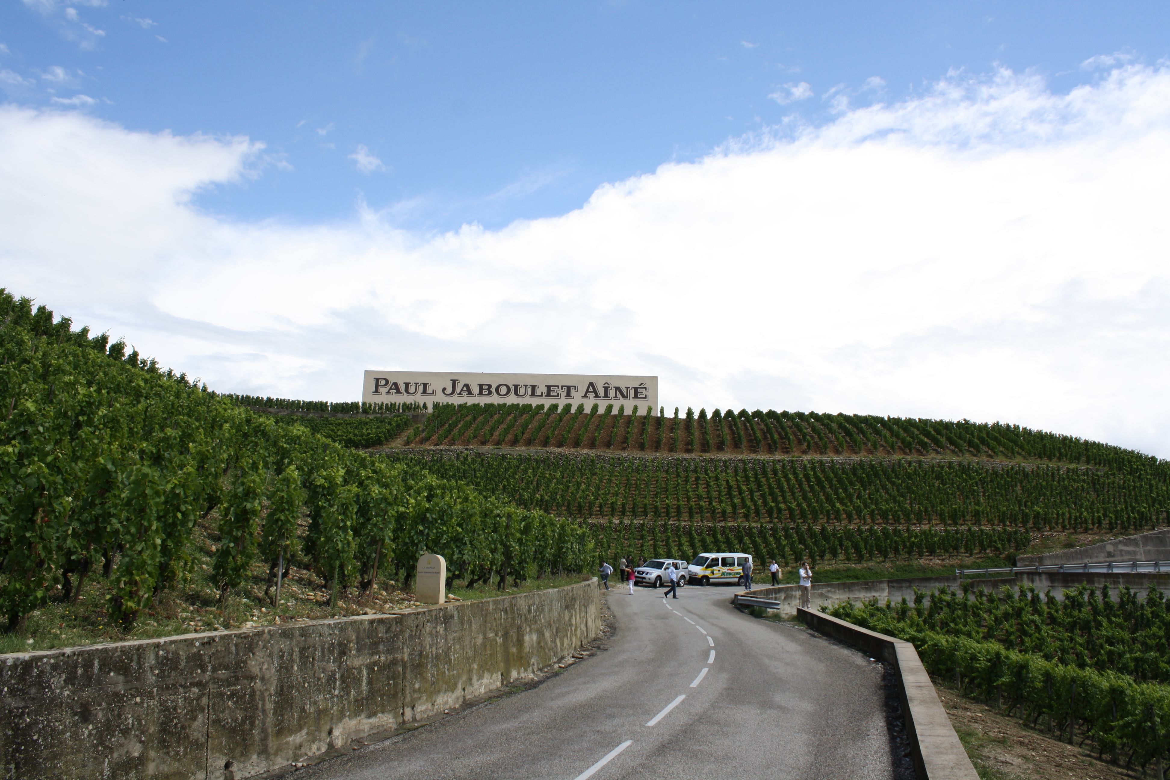 Vignobles P. Jaboulet aîné à Tain l'Hermitage